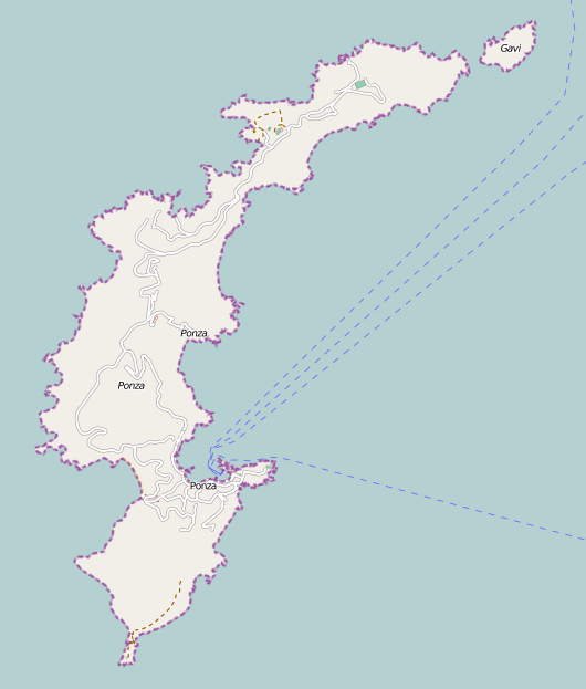 Cartina dell'isola di Ponza